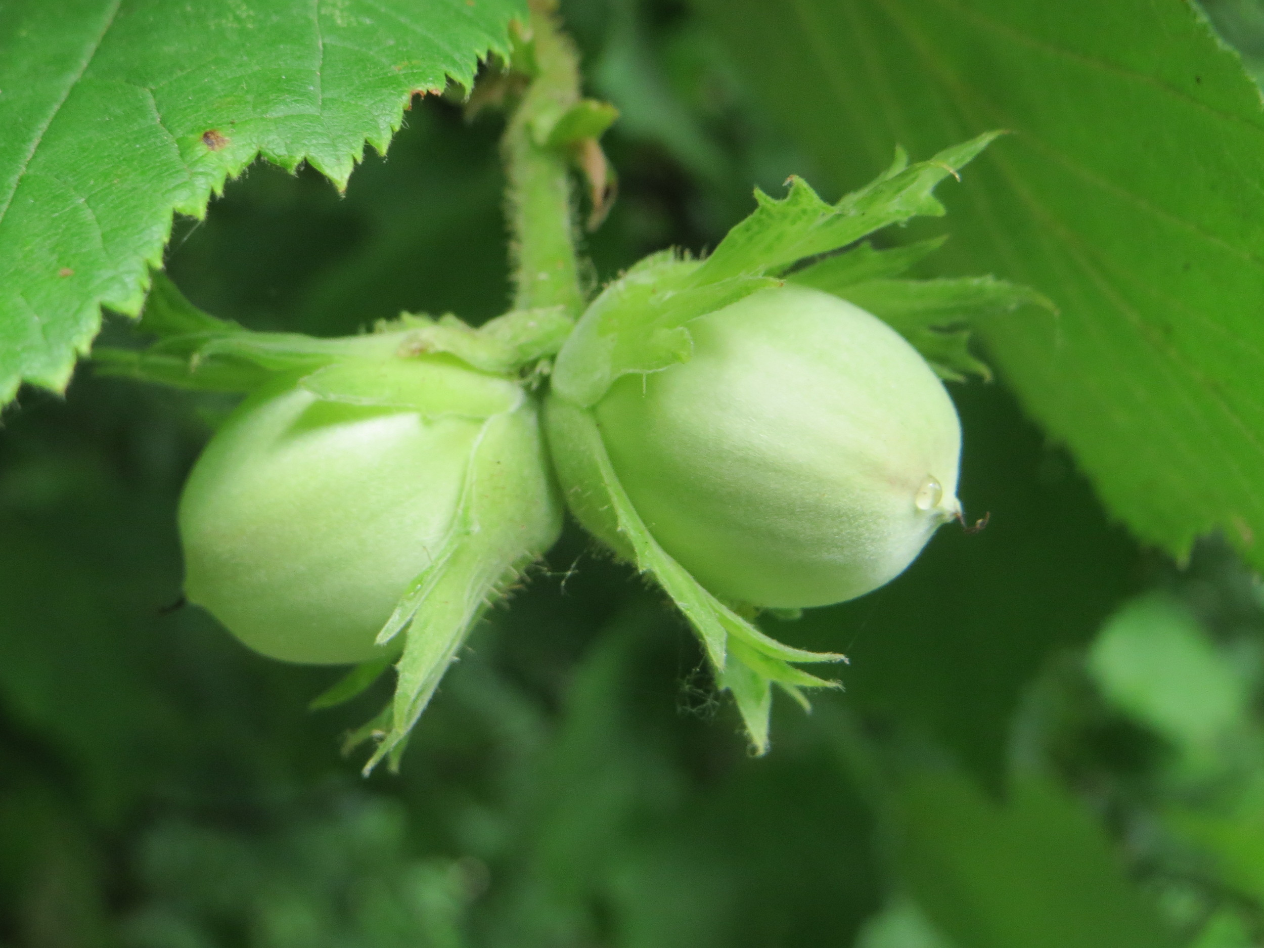 Haselnuss (Corylus avellana) am Staden in Saarbrücken